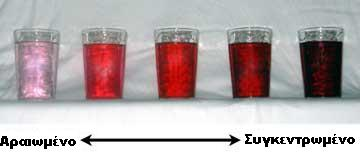 Πολύ απλή επίδειξη ποιοτικών διαφορών στη συγκέντρωση βαφής (απλό παράδειγμα αραίωσης-συγκέντρωση)